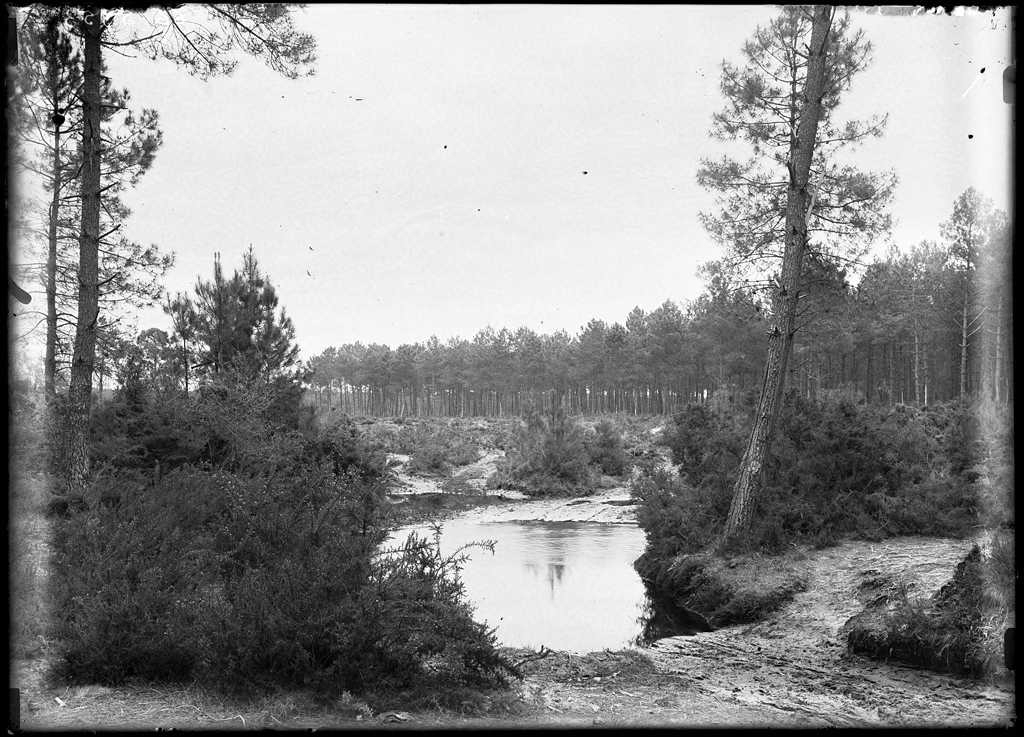 Reproduction numérique de la photographie de Félix Arnaudin réalisée le 4 avril 1902 sur plaque de verre (13*18cm) présentant la lagune et la forêt